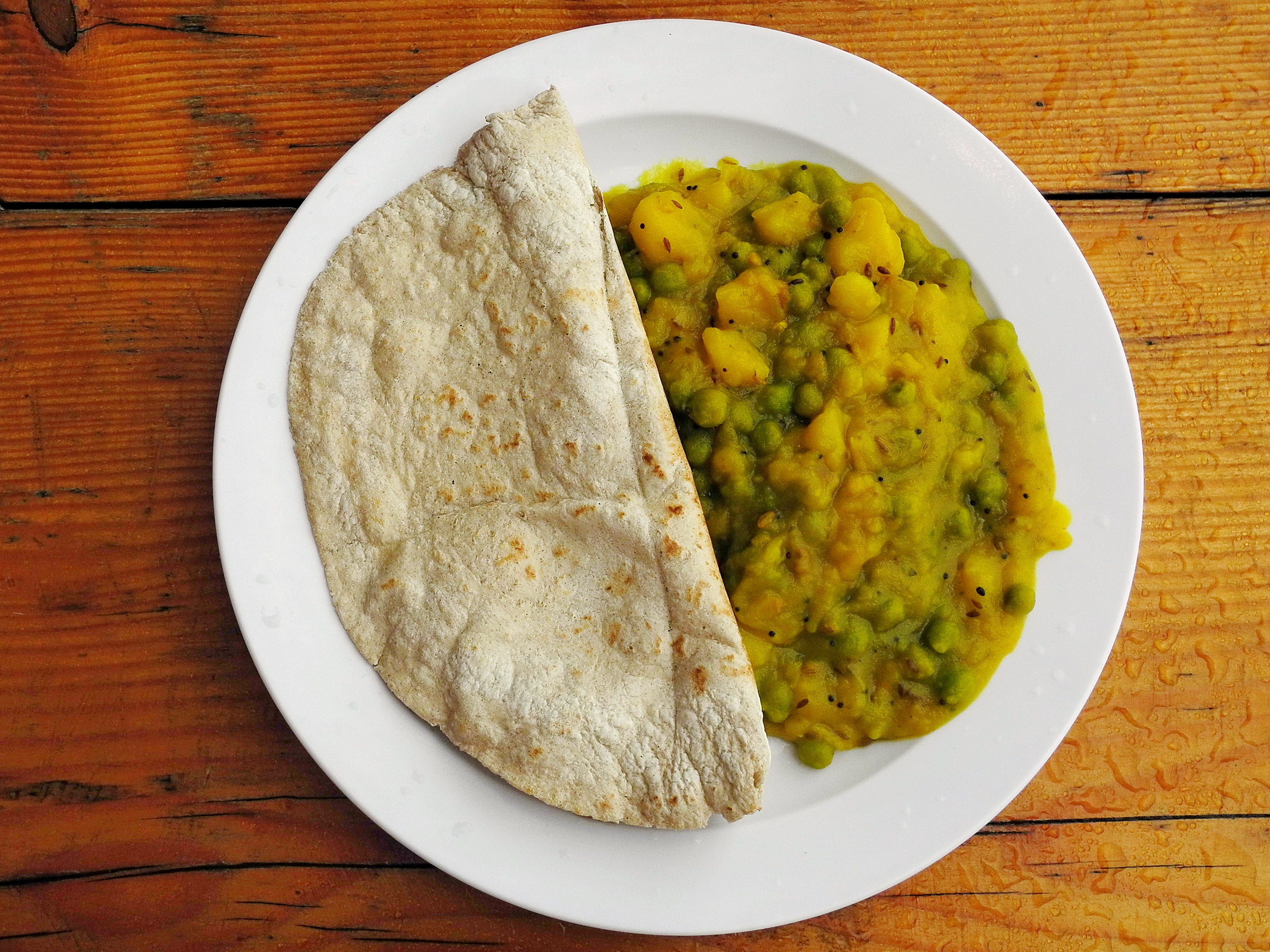 Chapati (Fladenbrot aus Ruchmehl) mit Kartoffel- und Erbsen-Curry, Theaterspektakel in Zürich-Wollishofen (Switzerland)